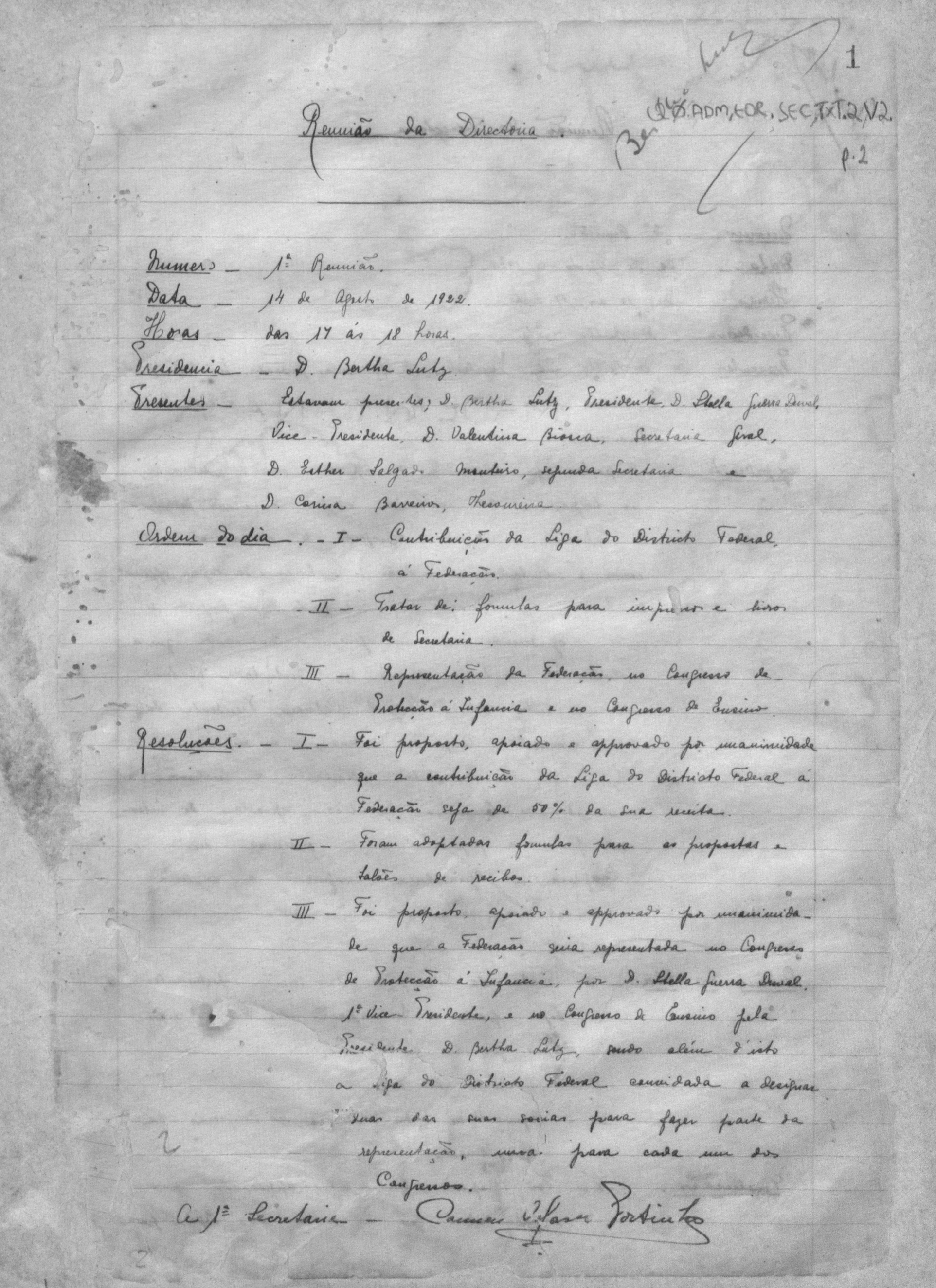 Ata da primeira reunião de diretoria da Federação Brasileira para o Progresso Feminino – FBPF. Fundo: Federação Brasileira pelo Progresso Feminino.